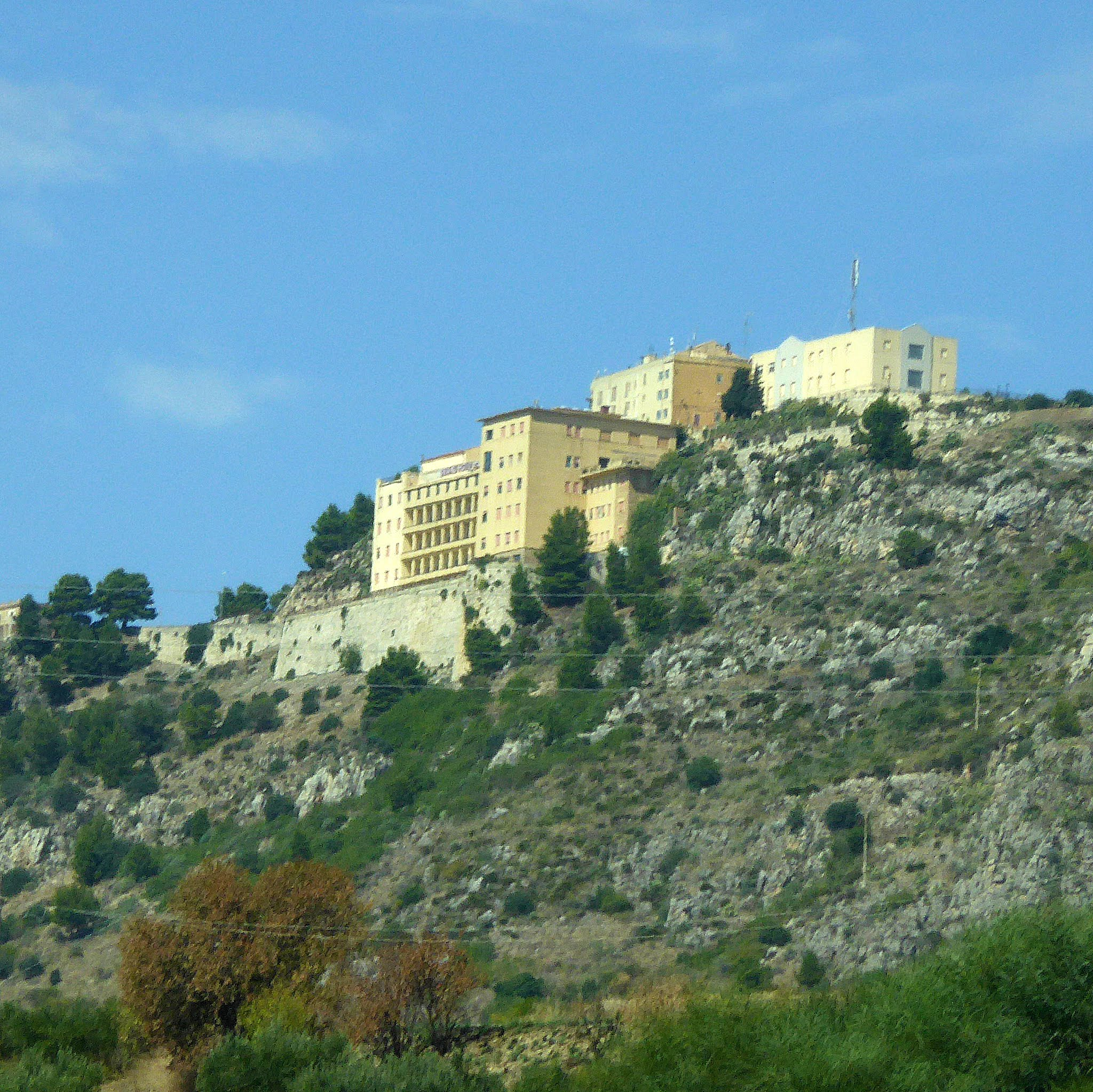 Sciacca